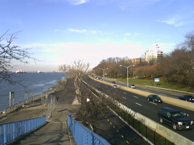 Belt Parkway bettwen exits 1 and 2.